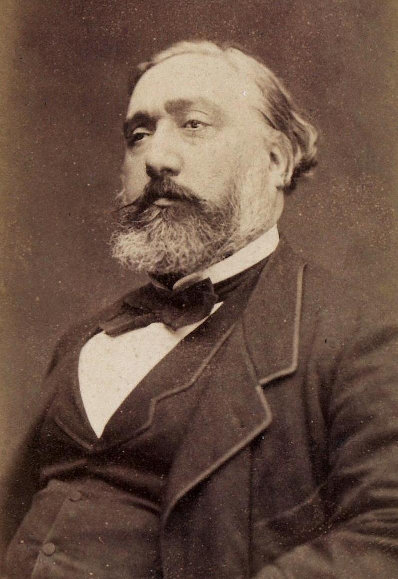 Photo carte de visite de Léon Gambetta. Sépia, 5x8,5 sur carton 6,5x10,5 cm. Photographe Étienne Carjat(1828-1906), après 1869.